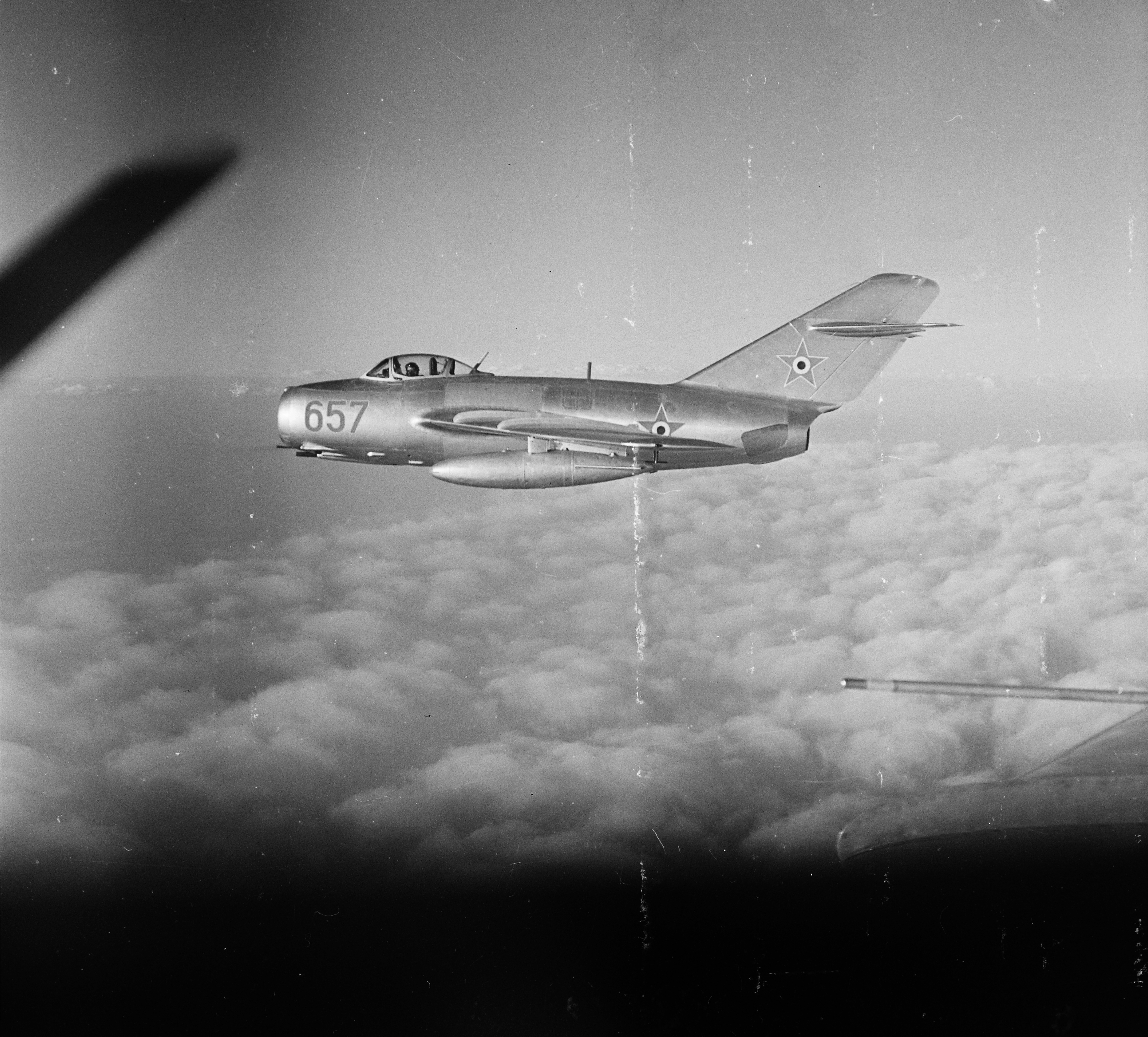 MiG-15-ös típusú vadászrepülőgép. Tags: airplane, fighter;plane, military, transport, Hungarian air force, Soviet brand Title: MiG-15-ös típusú vadászrepülőgép.